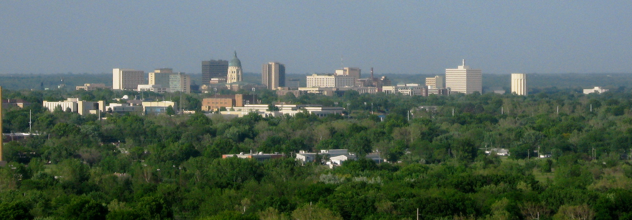 Topeka, Kansas, skyline